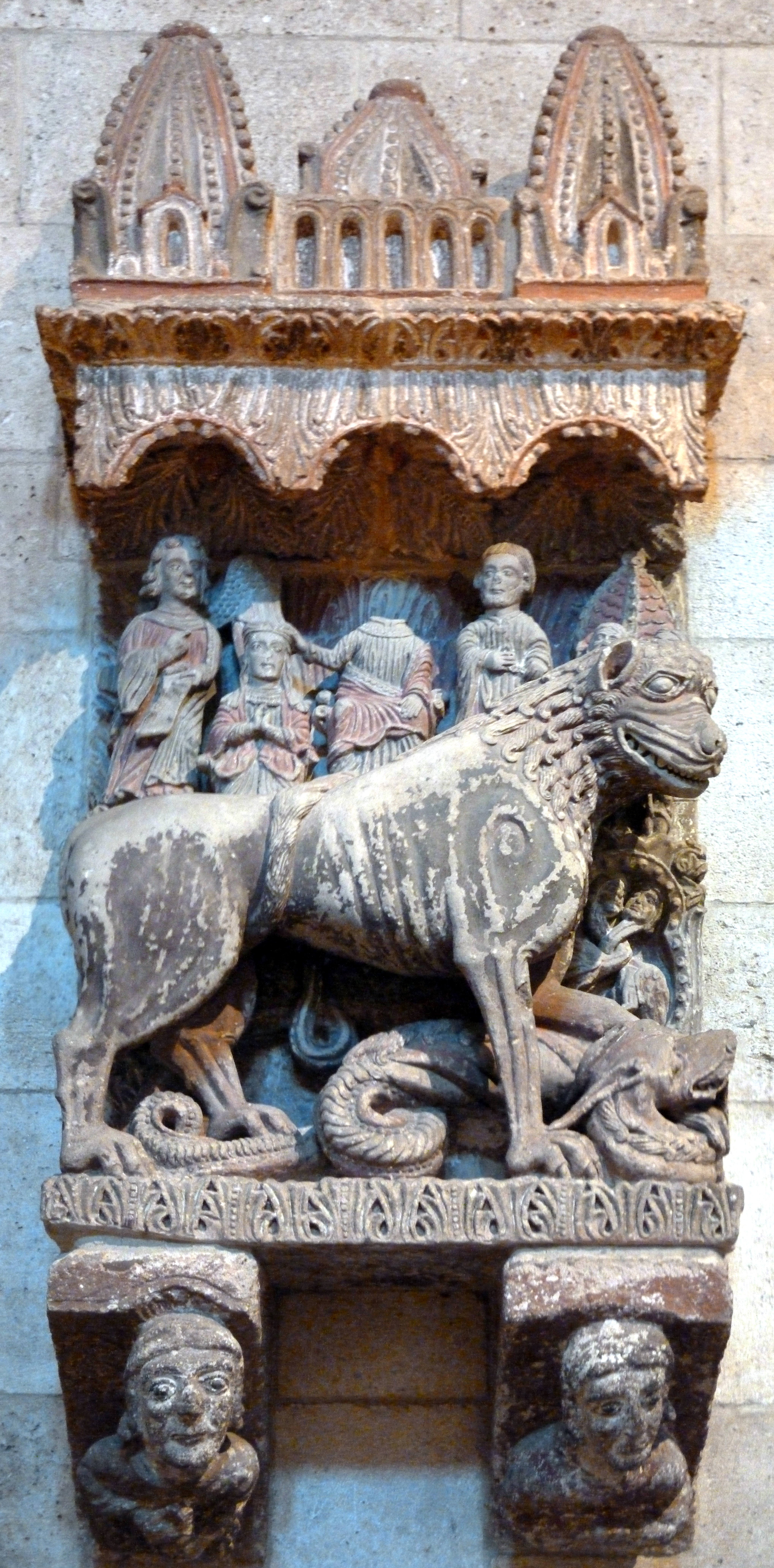 Relieve de la Iglesia de San Leonardo. Zamora. Actualmente en el museo "The Cloisters" de Nueva York.